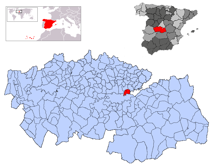 Mocejón en la provincia de Toledo